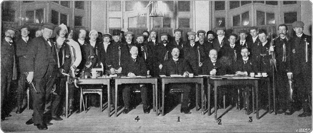 Groep deelnemers aan de Elfstedentocht, die zaterdagochtend om 5 uur afreden. De tocht werd uitgeschreven door de Nederlandse Bond voor Lichamelijke Opvoeding, onder leidng van de Friese IJsbond. Deze elf steden zijn: Leeuwarden, Franeker, Harlingen, Bolsward, Workum, Stavoren, Sloten, Hindeloopen, IJlst, Sneek, Dokkum. - Winnaar van de grote verguld zilveren medaille was M. Hoekstra (5) uit Warga, die 19:10 's avonds te Leeuwarden aankwam. G.D. v.d. Ley (6) uit Marrum won een zilveren medaille als tweede aankomende op 19:13; luitenant Roozeboom (7), die 19:16 arriveerde, behaalde de grote bronzen medaille. - Op de voorgrond de bestuurders van de IJsbond: 1. de heer S.H. Hielkema, voorzitter; 2. mr. J.D. v.d. Plaats, penningmeester; 3. mr J. Lucardi, secretaris; 4. G.W. Koopmans.